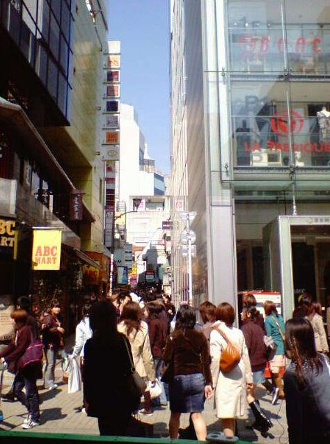 スペイン坂 撮影日 2005年3月26日 撮影者 本人